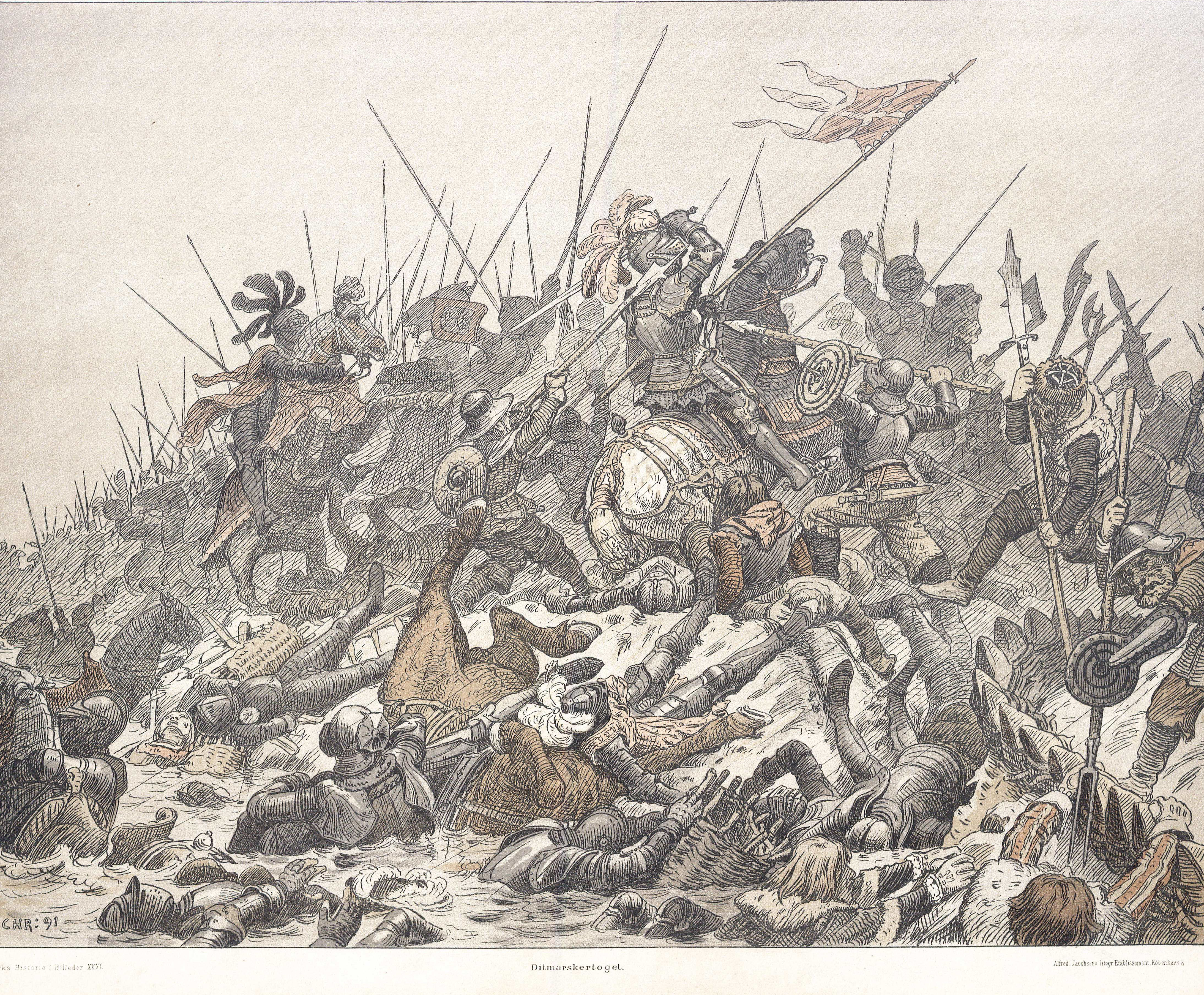 Slaget fandt sted i år 1500. (Rasmus Christiansen, 1863 - 1940)